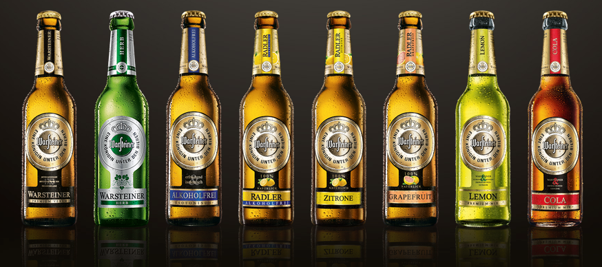 Warsteiner Brauerei, Biervariationen